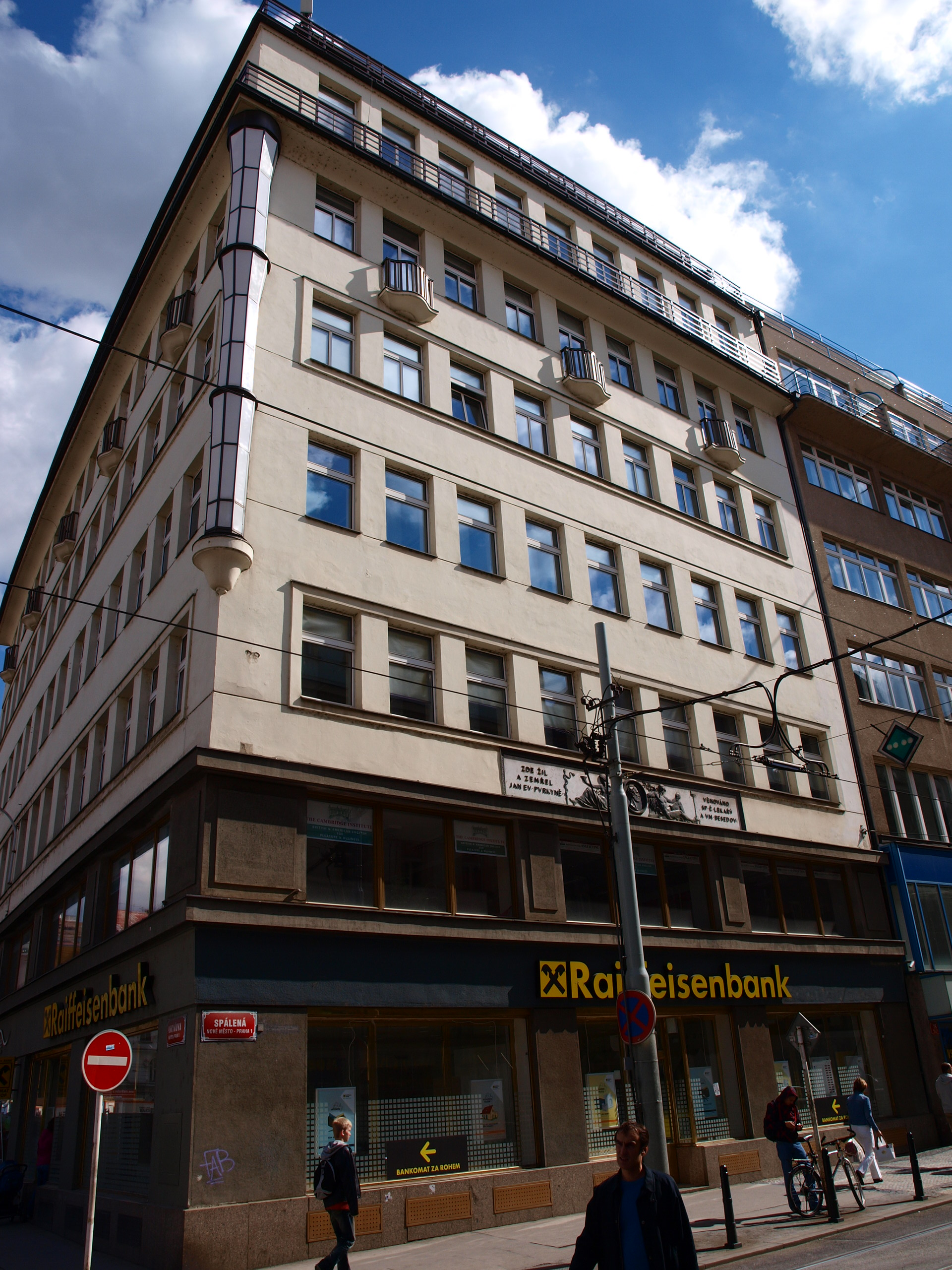 Palác Purkyňova